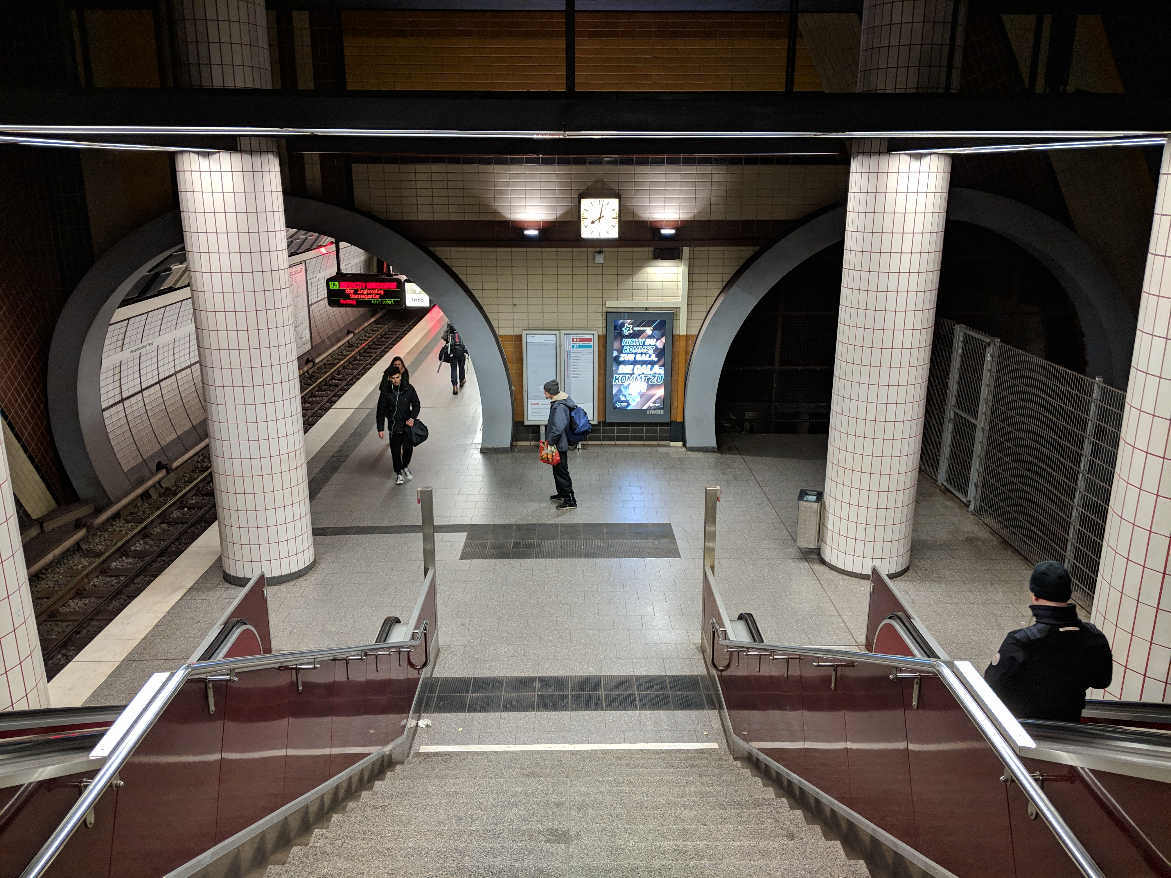 Nicht genutzte Röhre am Hauptbahnhof Nord in Hamburg